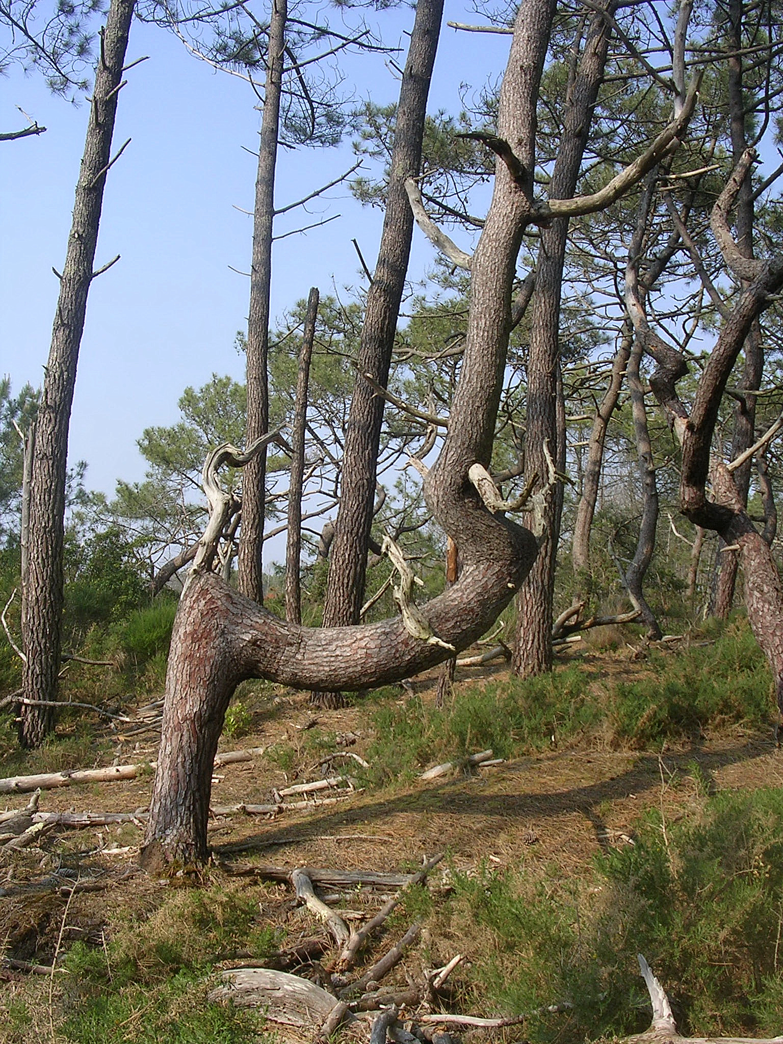 Arbre de la forêt de prtection de Mimizan Plage (sur le site de la Malloueyre), déformé par l'action des vents. Landes, France.